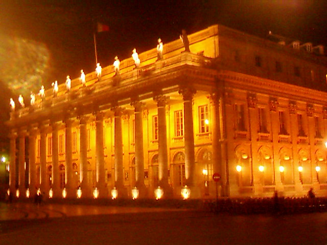 Grand Théatre de Bordeaux